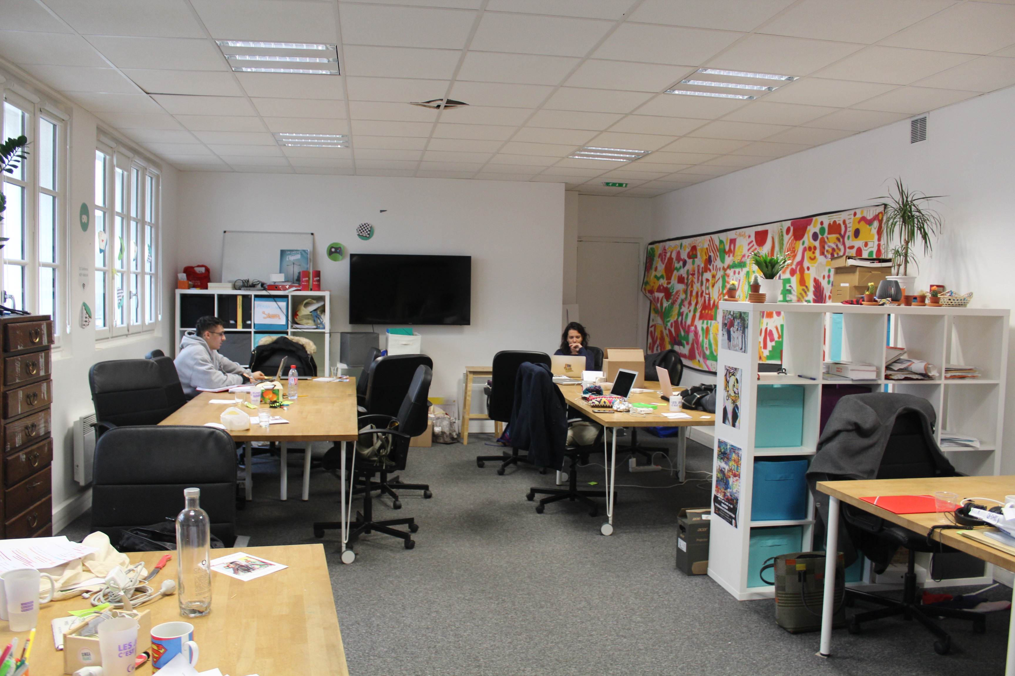 Bureau de l'association Singa au premier étage de Kiwanda